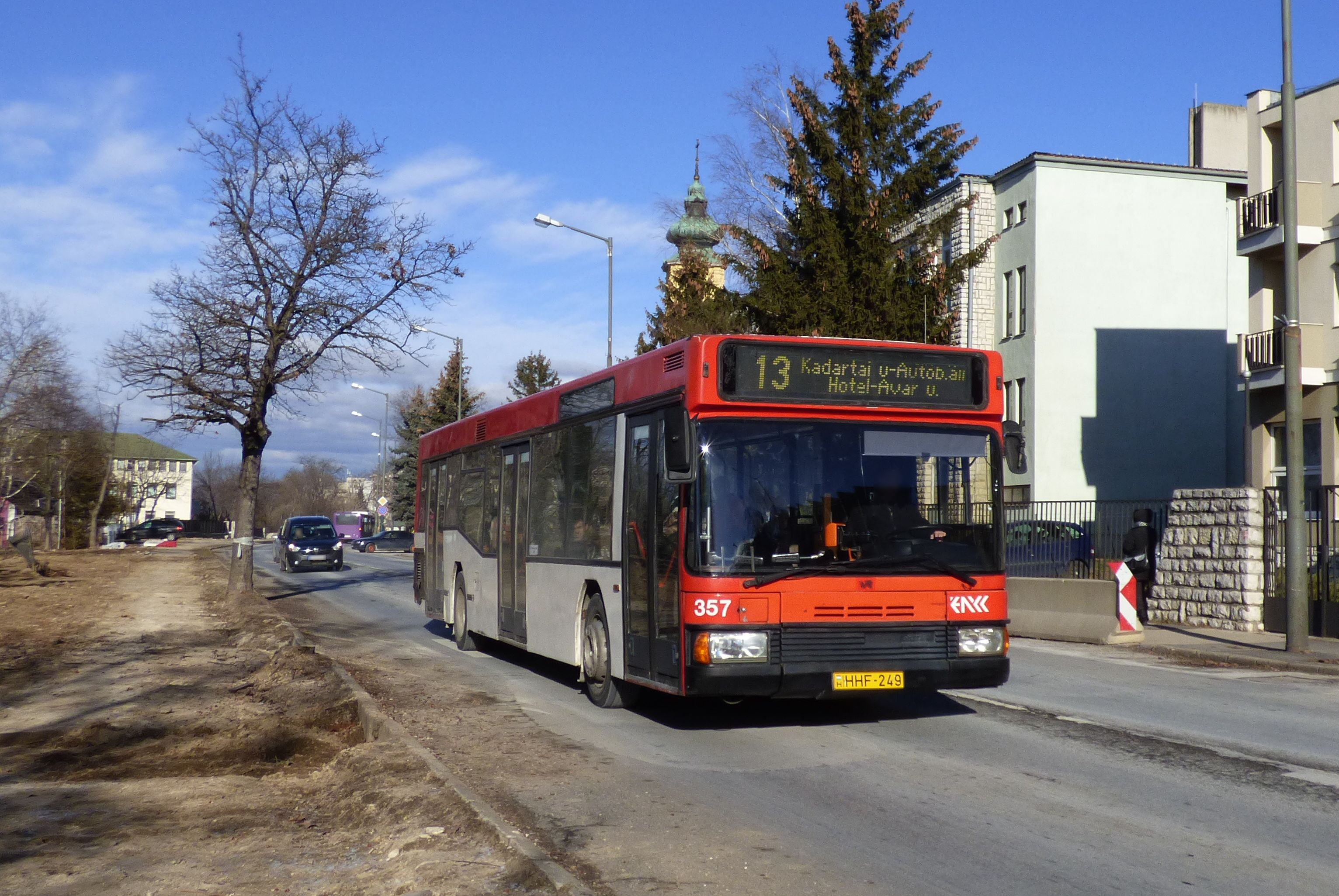 Az ÉNYKK Neoplan N4014 NF típusú autóbusza a Jutasi úton a veszprémi 13-as vonalon